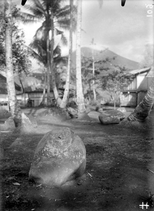 Negatief. Megalieten in Tandjoengara